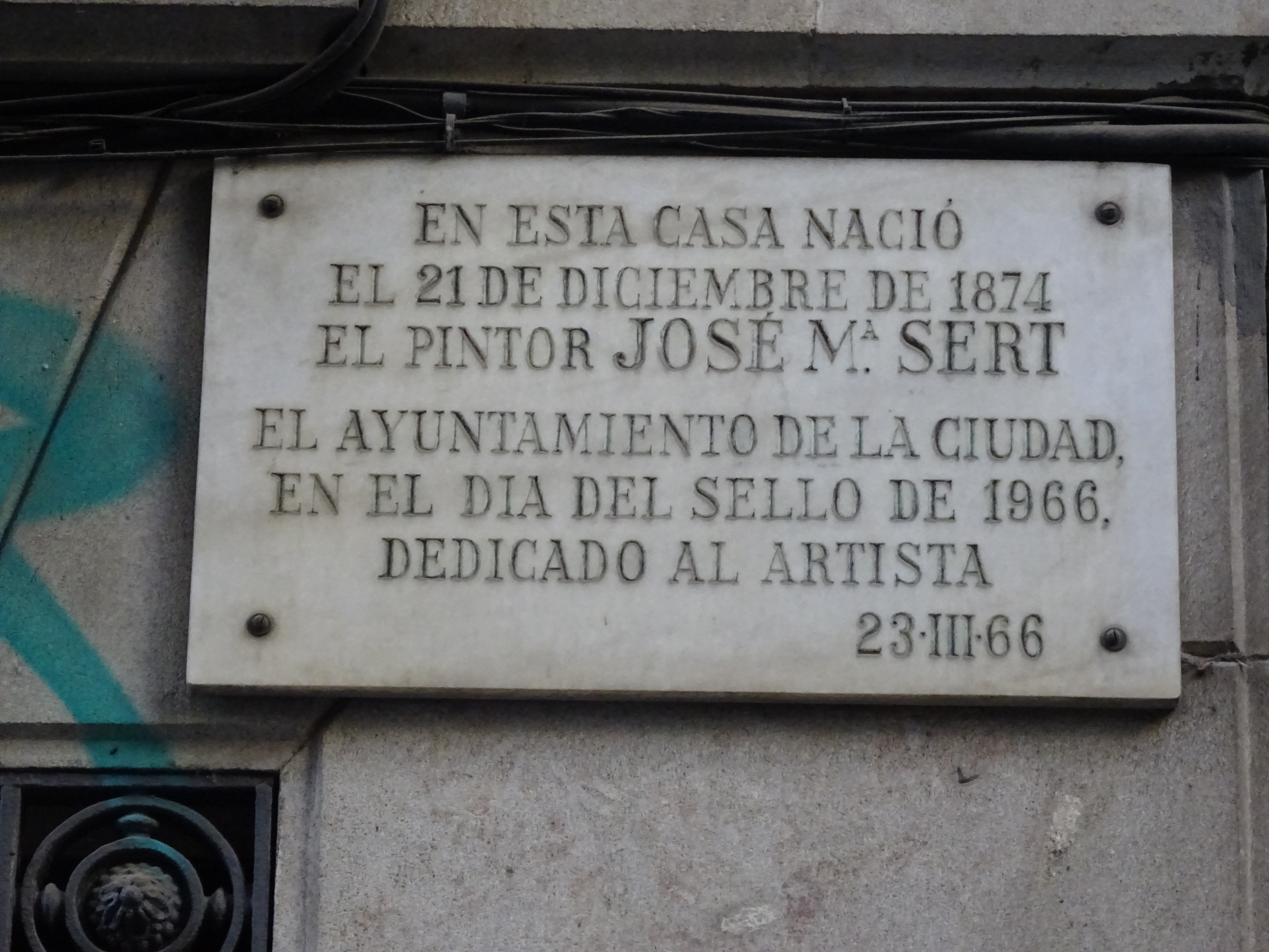 Placa indicativa de la casa donde nació José María Sert. El 21 de diciembre de 1874. El ayuntamiento de la ciudad (Barcelona) en el día del sello de 1966